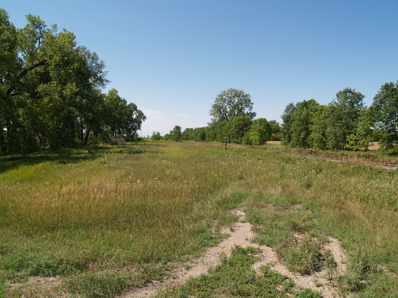 Girard, Minnesota